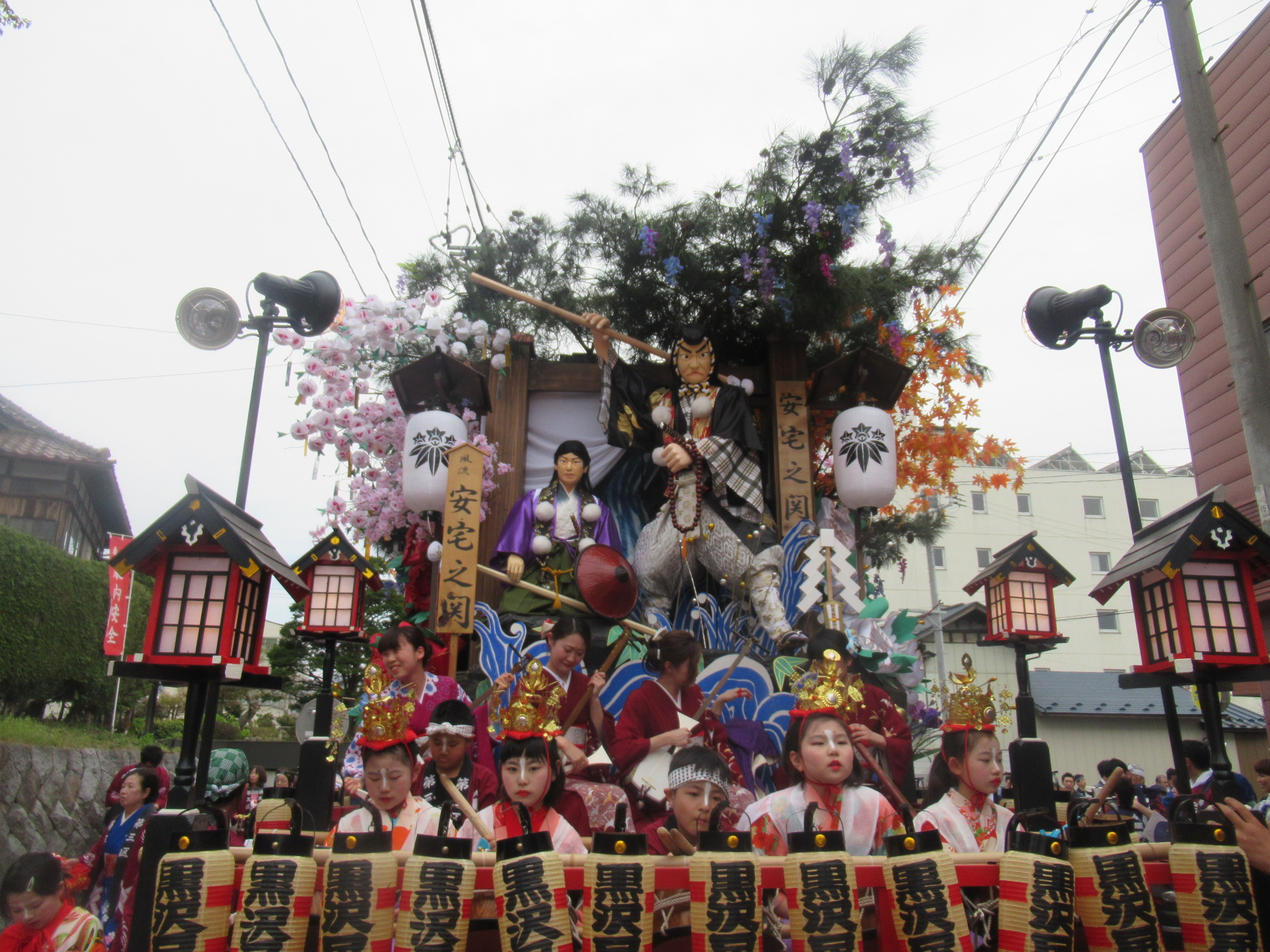 黒沢尻三区山車。